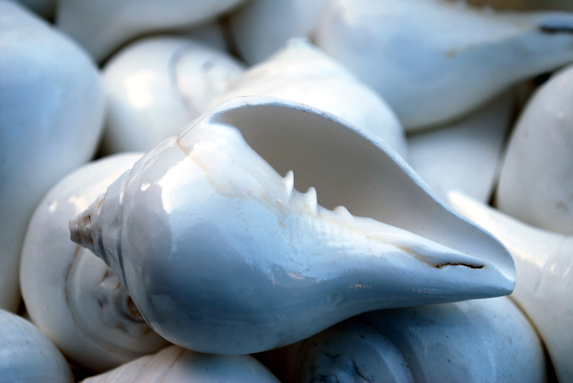 ശംഖ് (Turbinella pyrum)